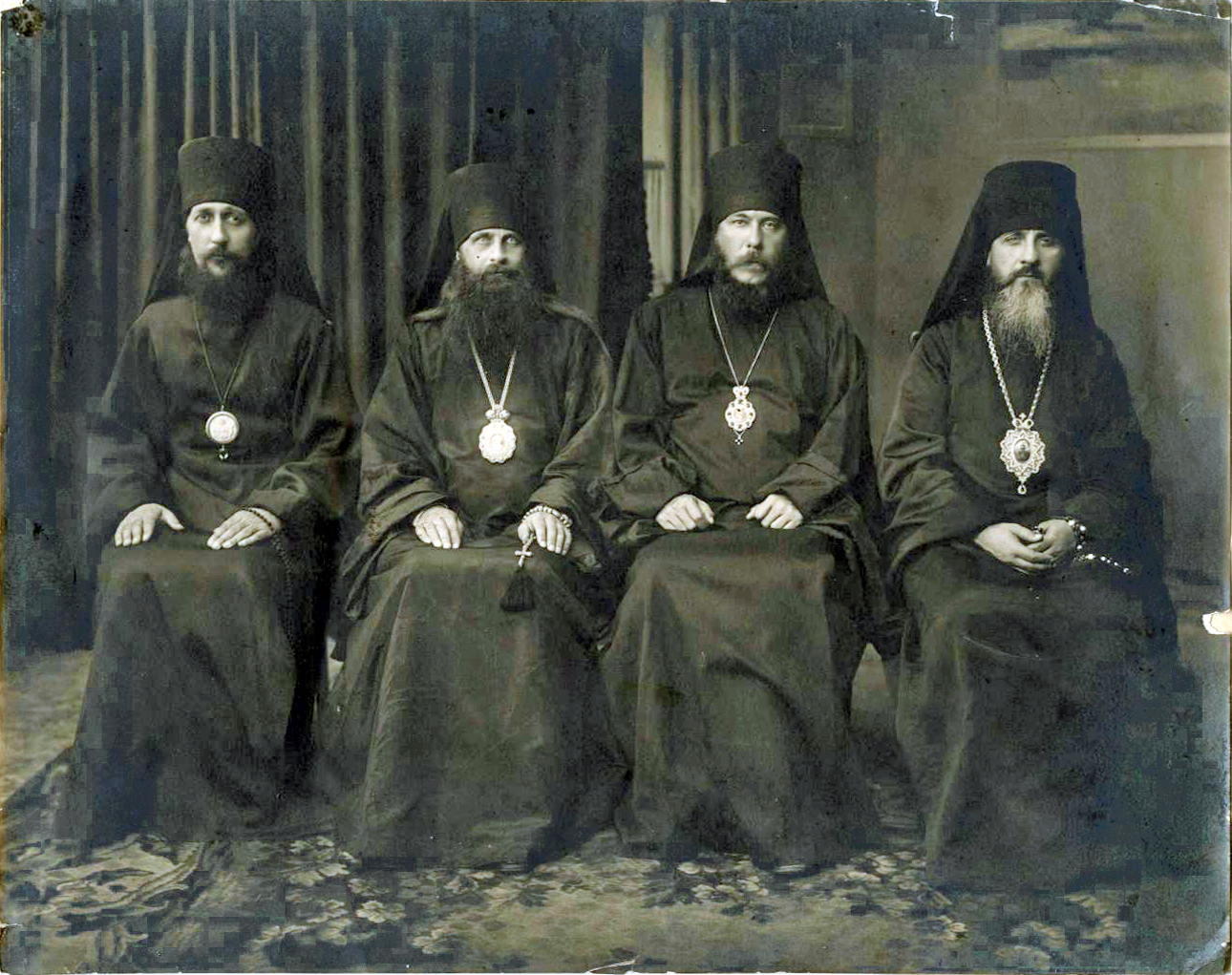 епископ Скопинский Игнатий (Садковский), архиепископ Рязанский Ювеналий (Масловский), епископ Новосильский Корнилий (Соболев), епископ Епифанский Виталий (Введенский)